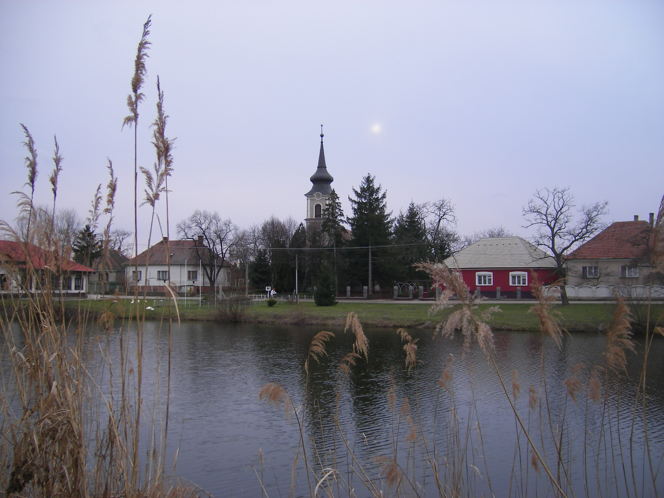 Martos, Horváth-tó, református templom